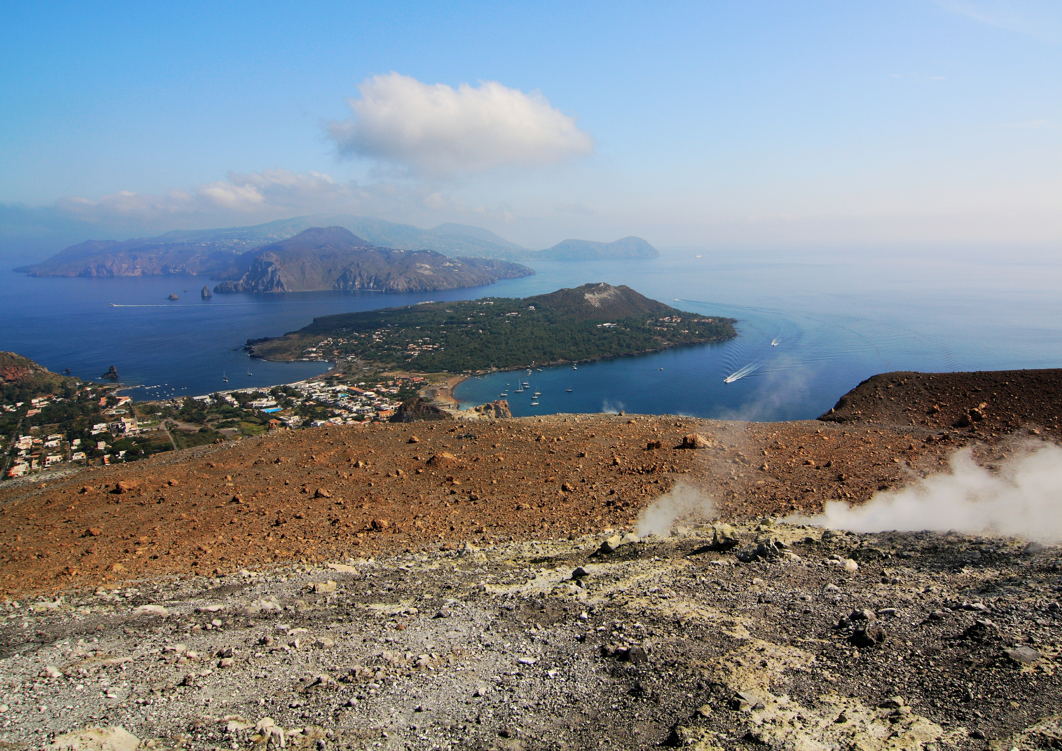 Vista dalla cima del cratere di Vulcano